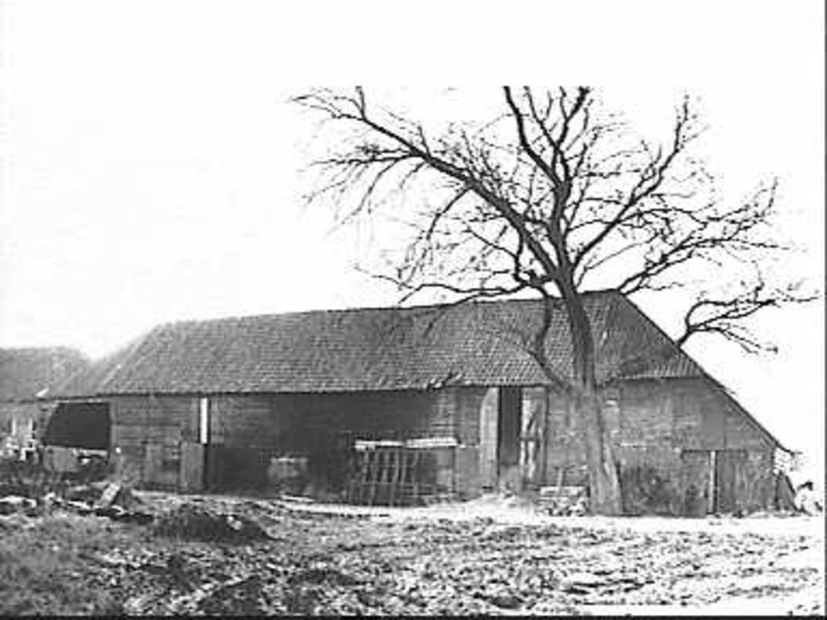 Wieringen/ Schuur: lange achtergevel (opmerking: Deze afbeelding hebben wij helaas alleen in deze lage resolutie.)